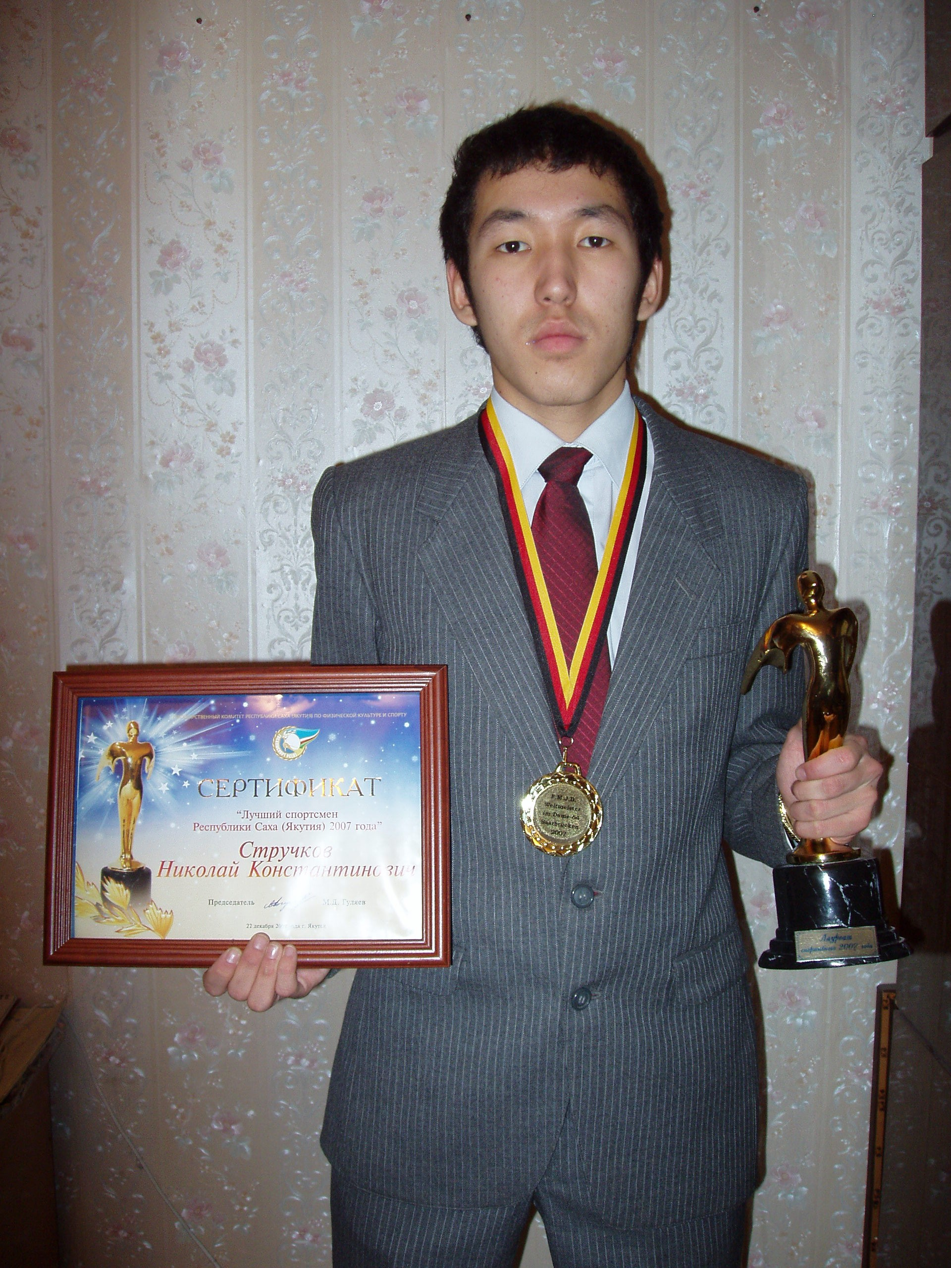 Николай Стручков